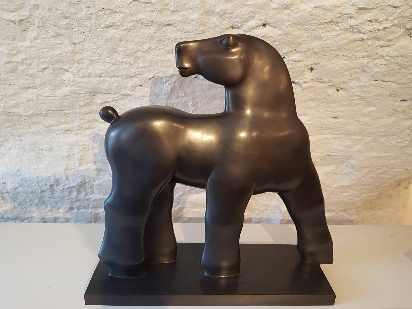 Kobe – In Al Zijn Glorie (In All Its Glory) – Bronze - 2011 – 51 x 53 x 17,5 cm